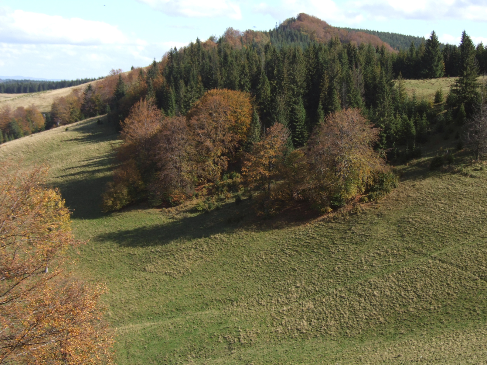 Smerekowa (Małe Pieniny)